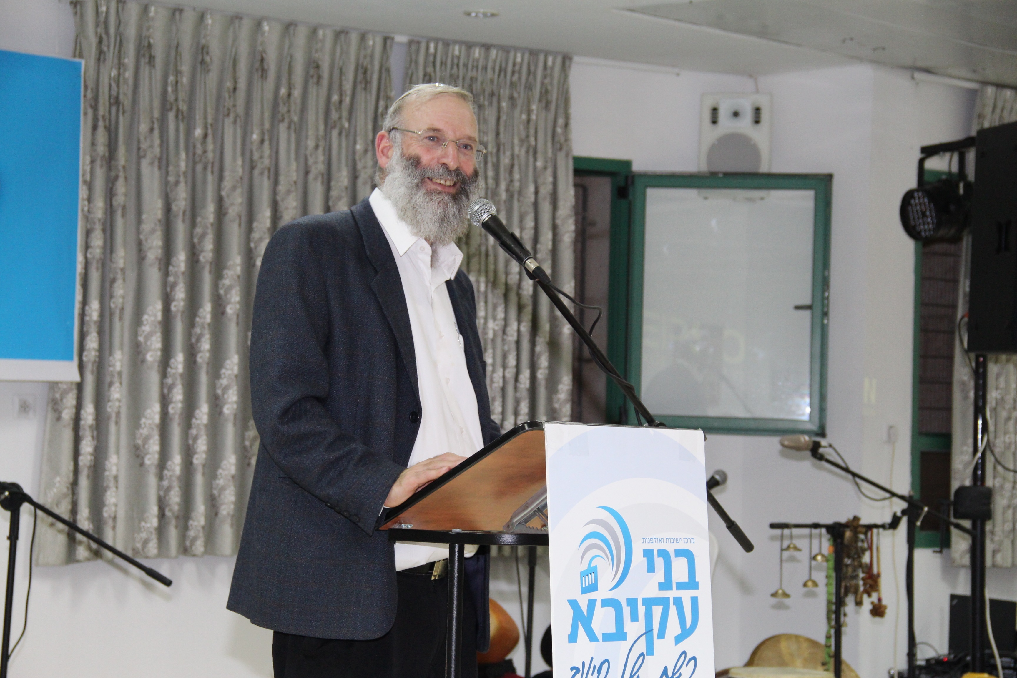 {הרב בני נכטיילר}